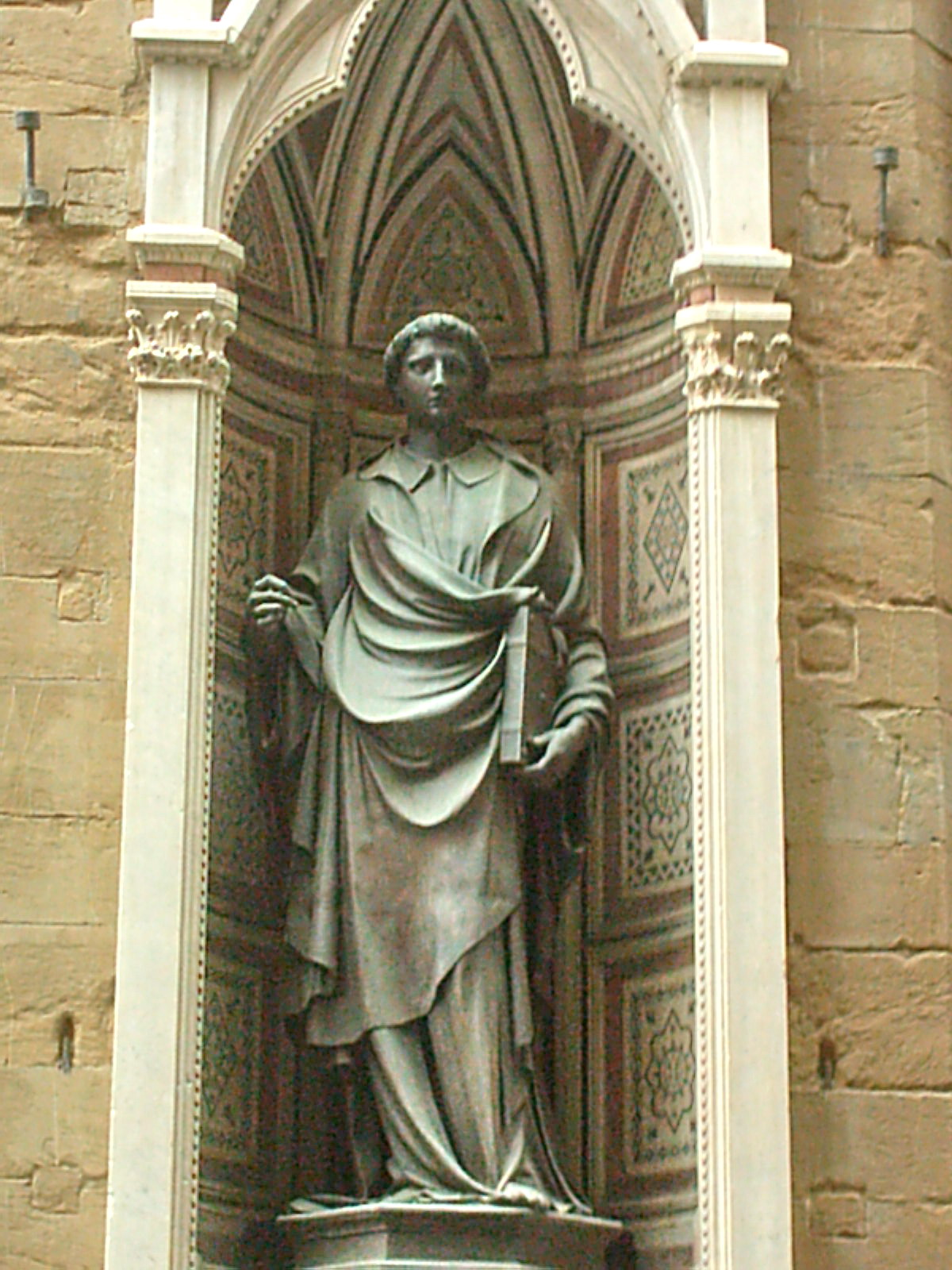 Statua di Santo Stefano, patrono dell'arte della lana nella nicchia di Orsanmichele.